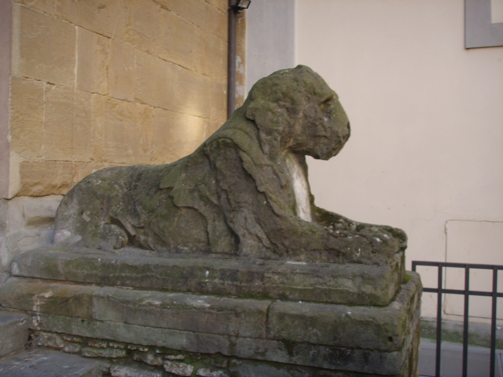 Statua di leone davanti all'ex chiesa di San Pancrazio a Firenze.